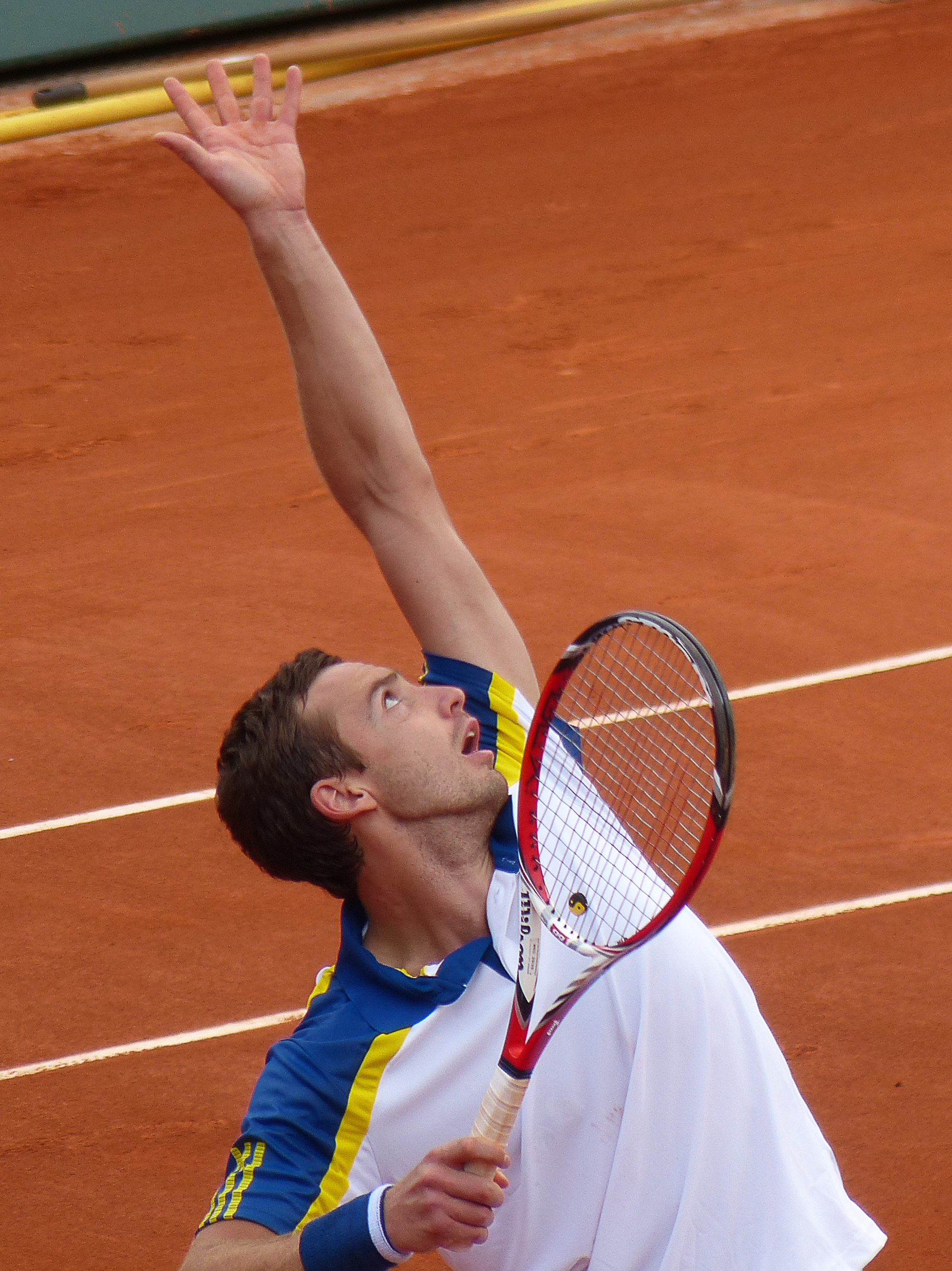 2ème tour Roland Garros 2013 : Gael Monfils (FRA) def. Ernests Gulbis (LAT)